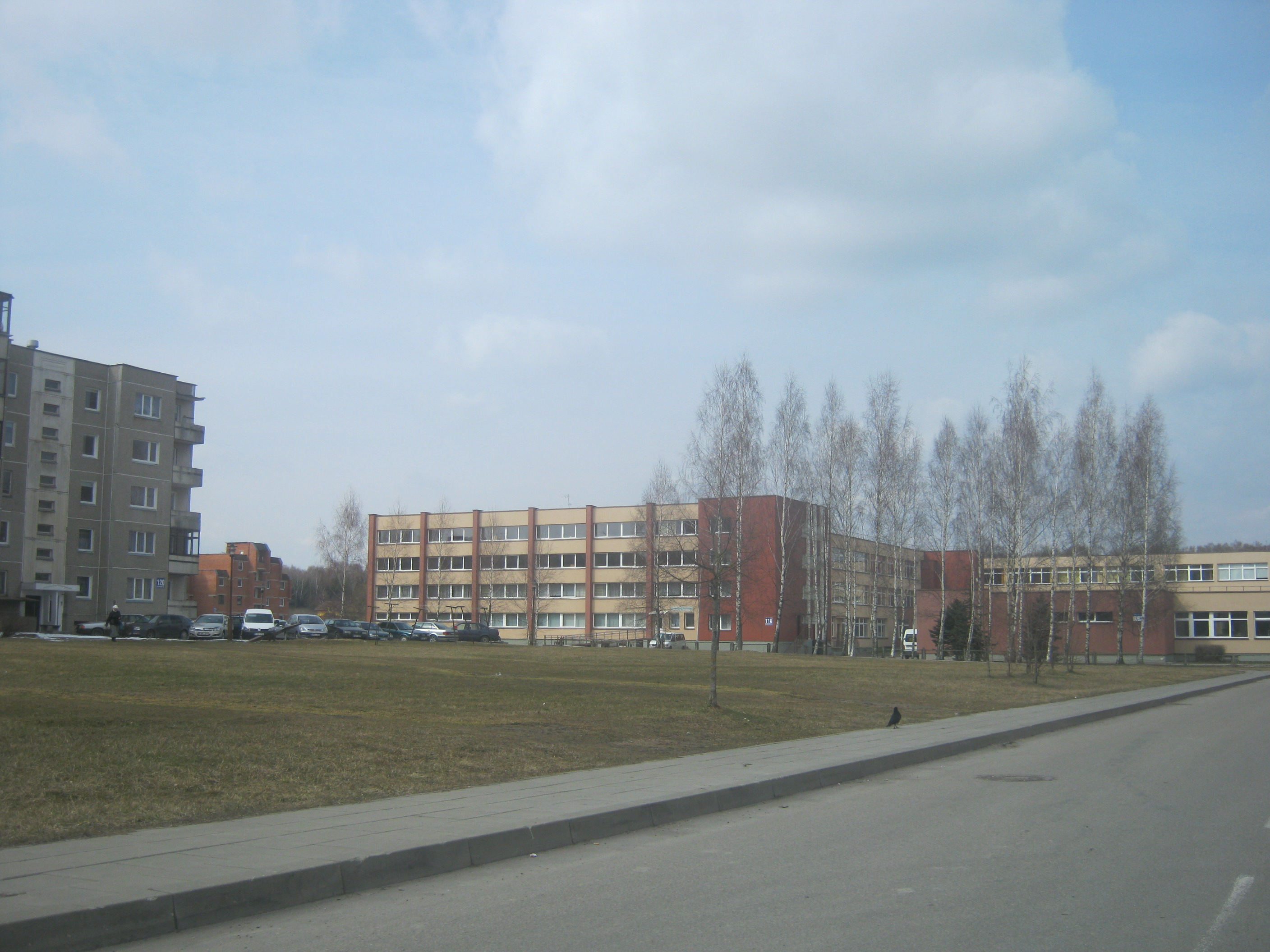 Kaišiadorių specialioji mokykla ir Kaišiadorių jaunimo ir suaugusiųjų mokykla